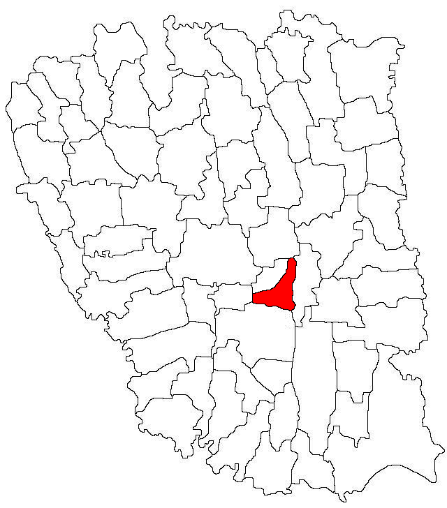 Categorie:Hărţi ale judeţului Galaţi